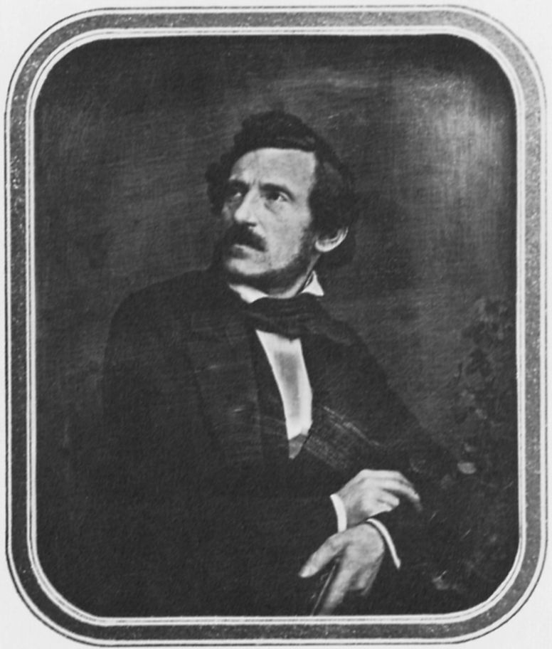 Originale Bildunterschrift: Der blinde Stelzner